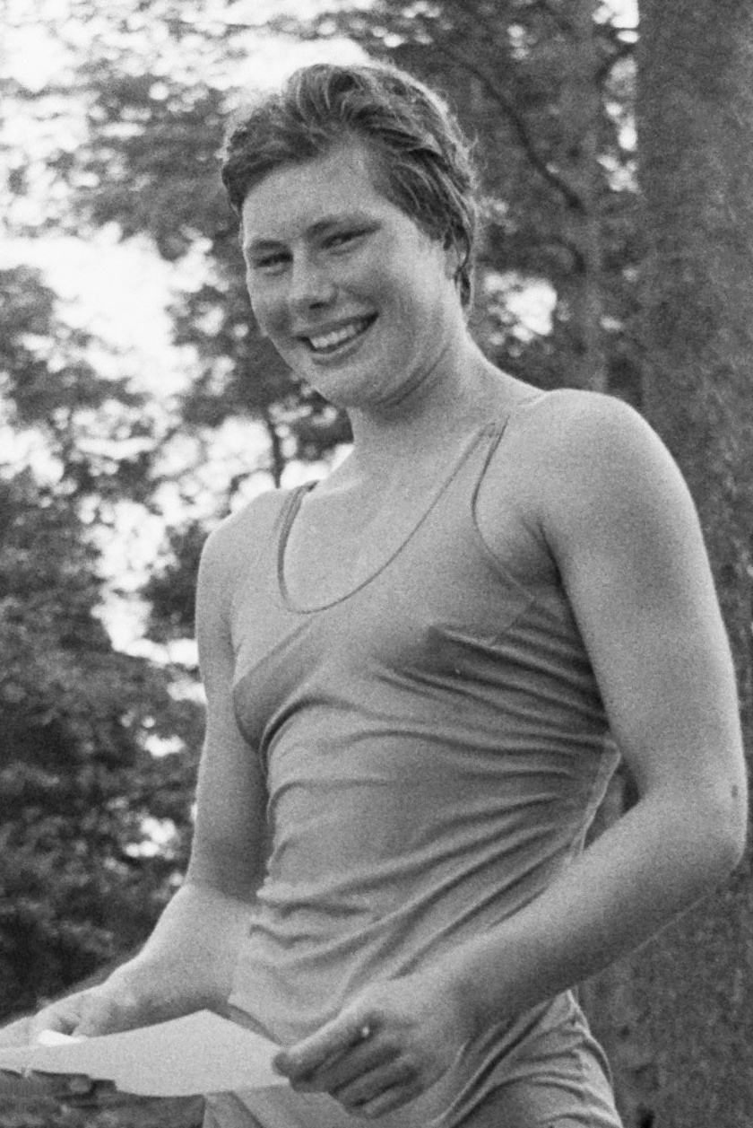 Ada den Haan